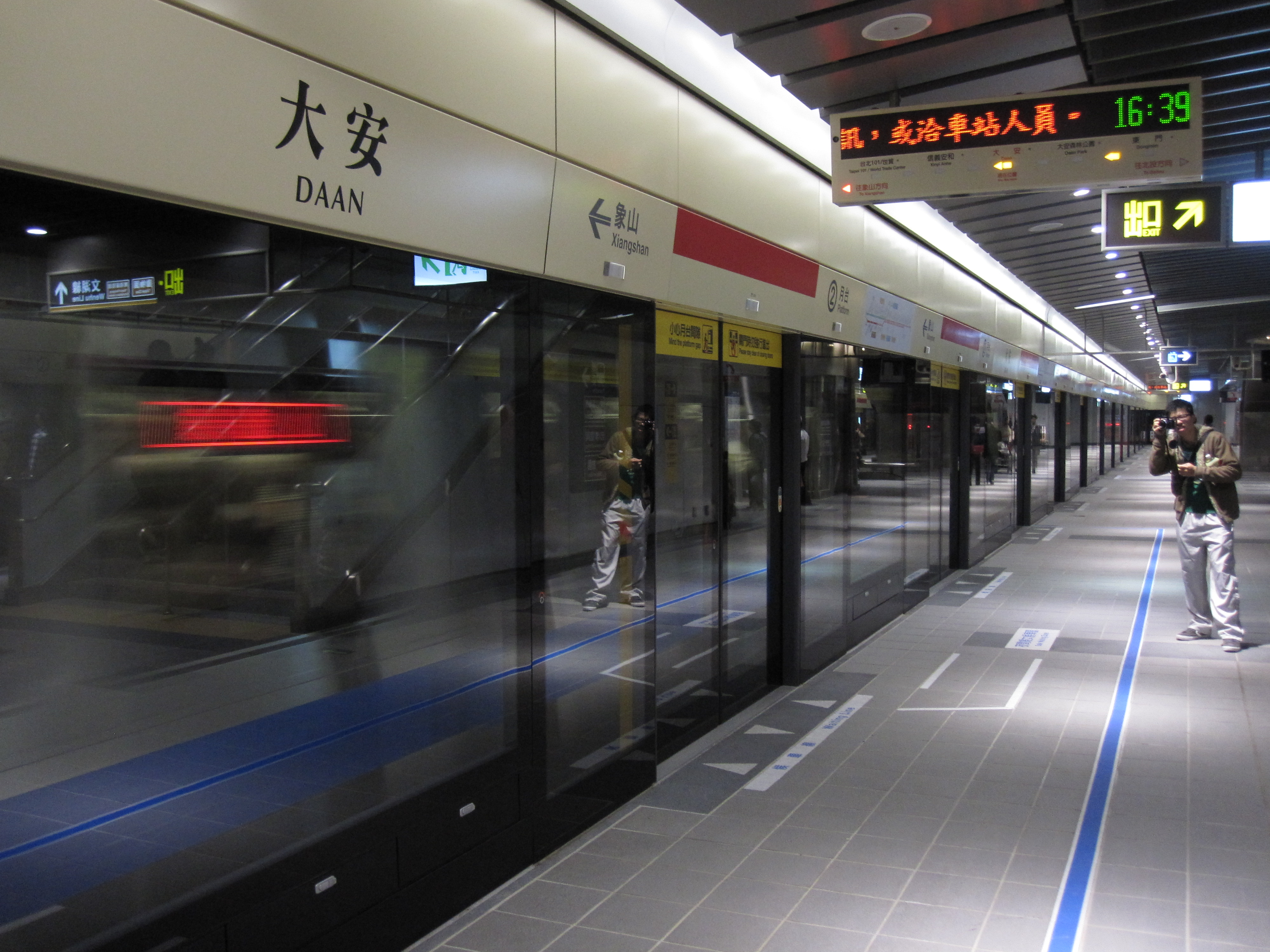 中文（台灣）: 台北捷運大安站信義線2月台。